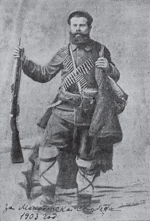 Bulgarian revolutionary Hristo Sirakov